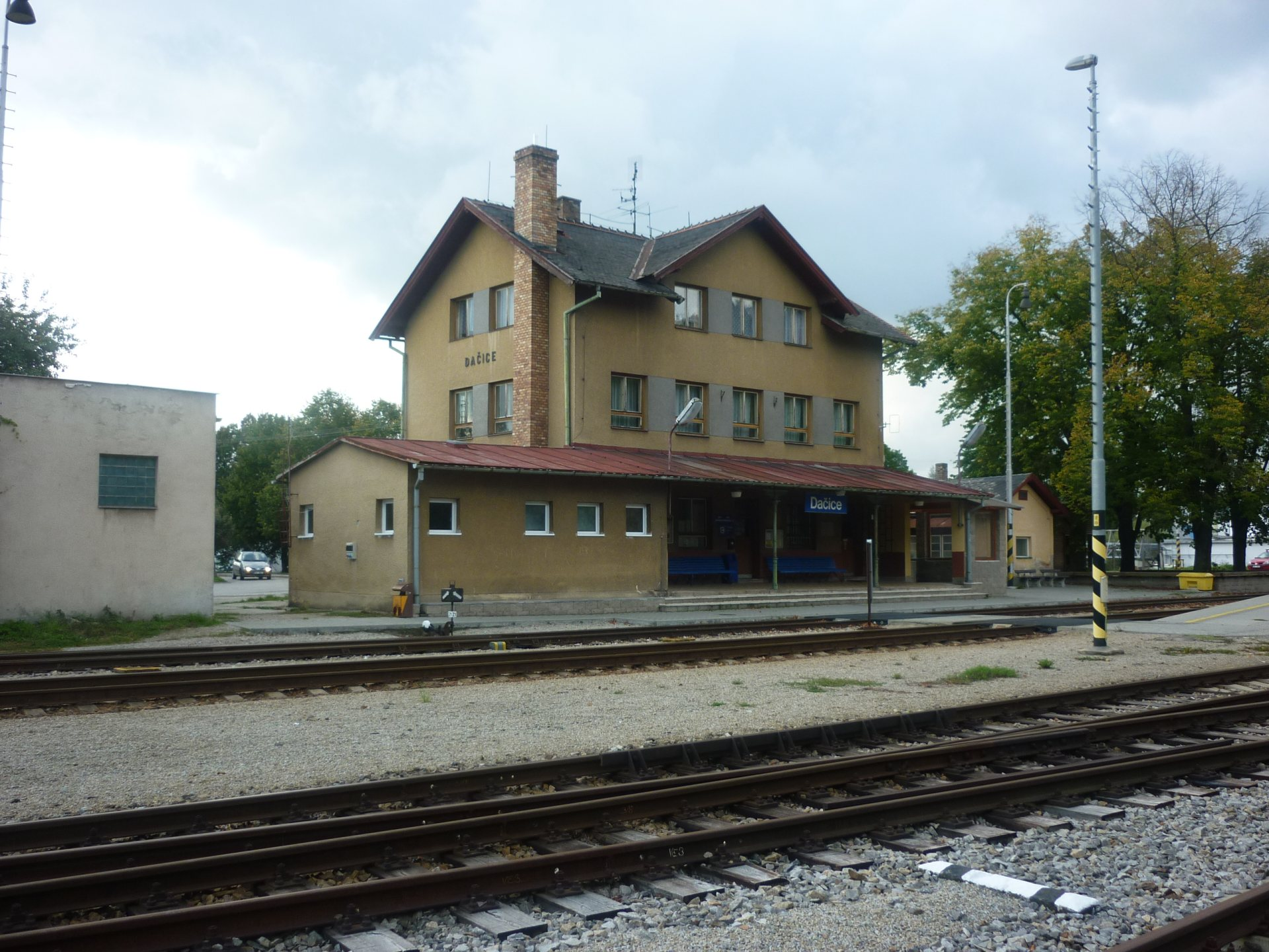 Železniční stanice Dačice